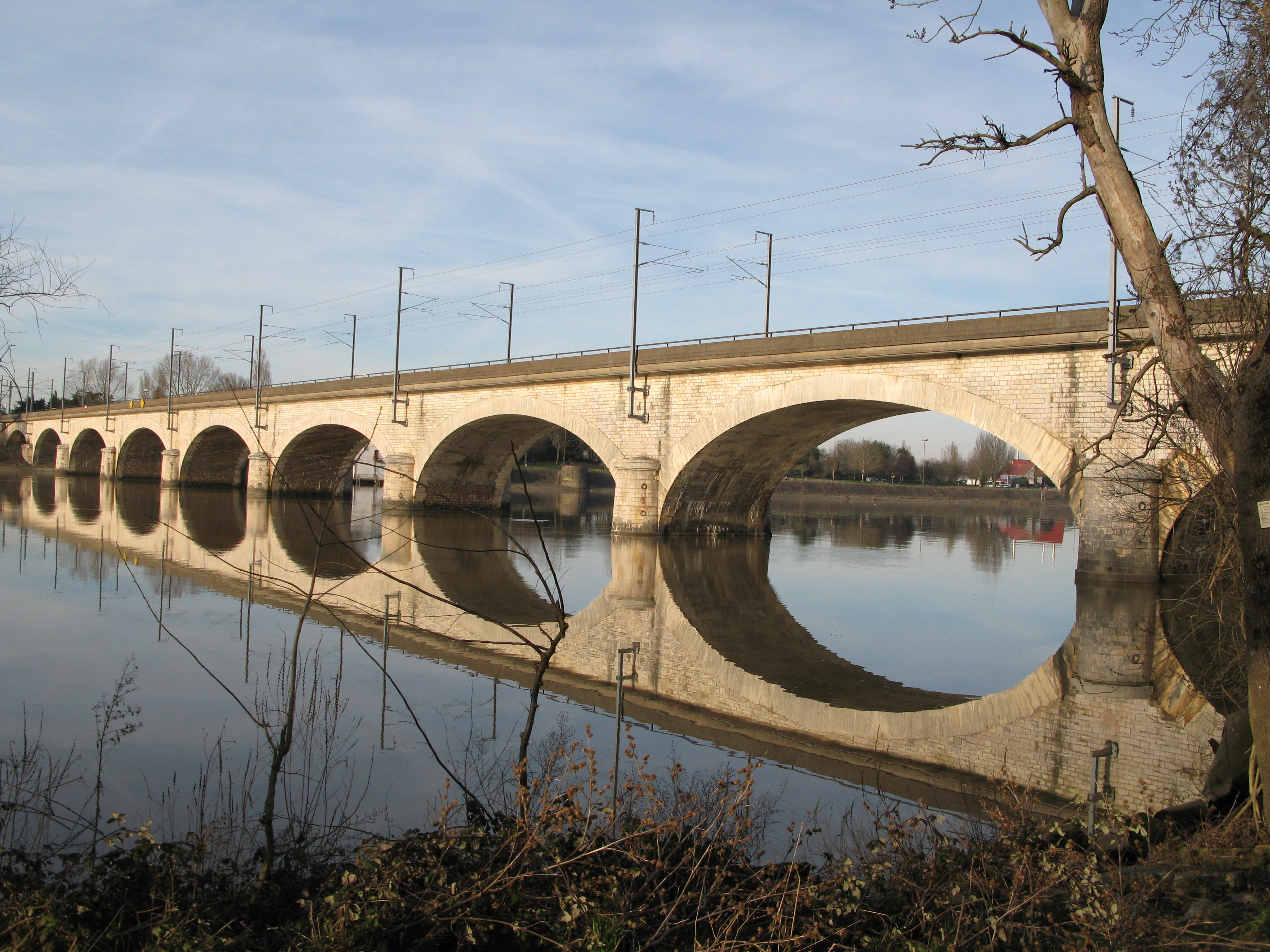 Nantes pont de la Vendée - ferroviaire